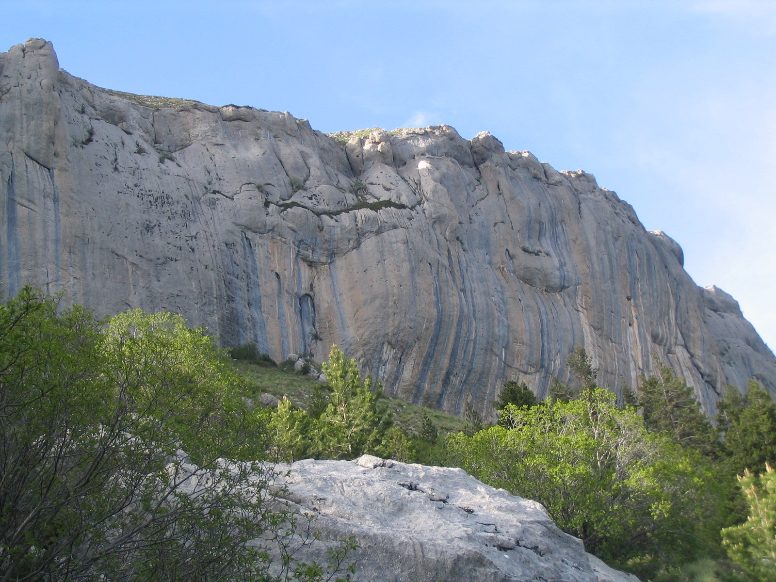 Falaise de Céüse, secteurs Berlin et Biographie